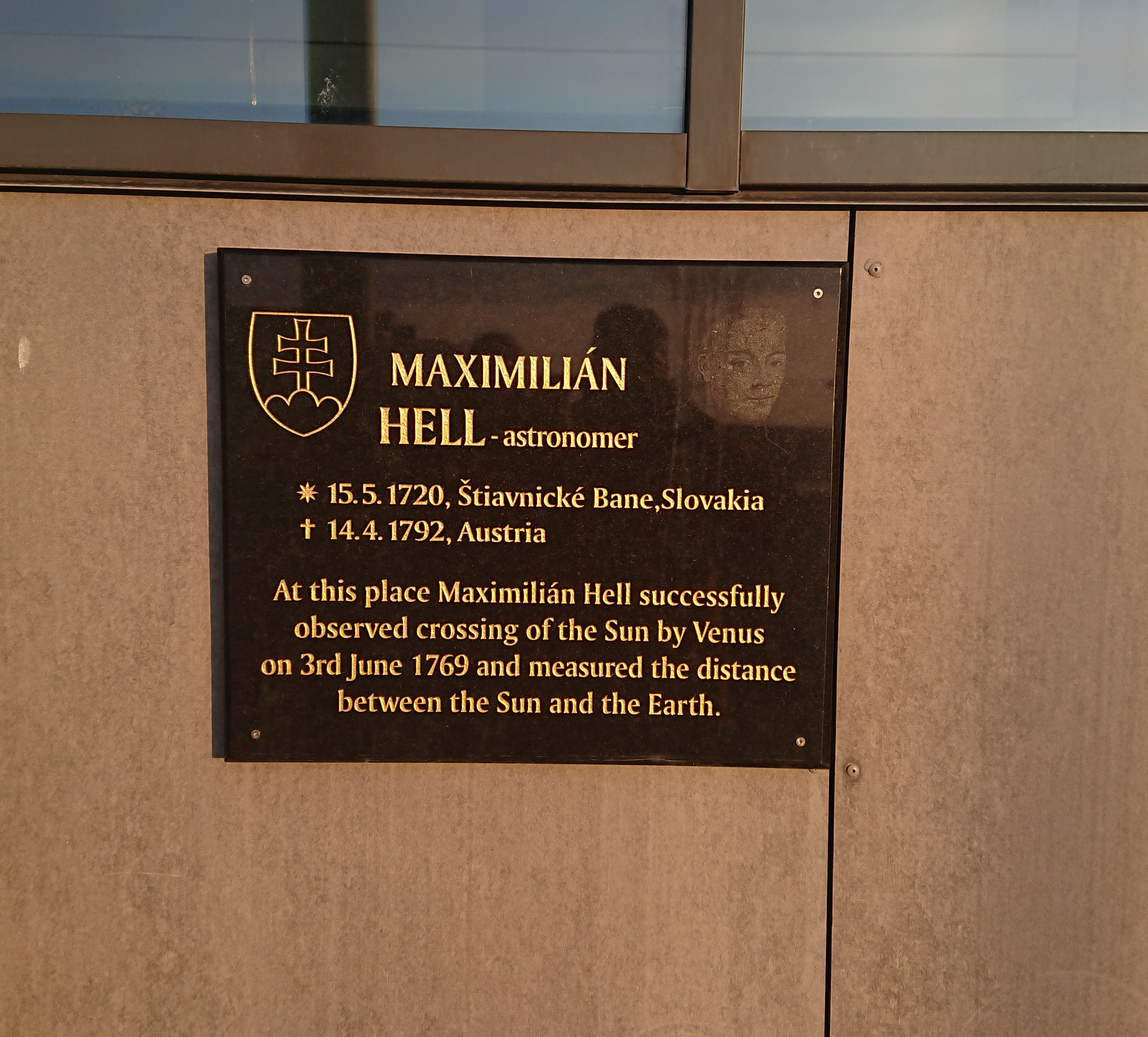 Plakett over Maximilian Hells observatsjon av Venuspassasjen